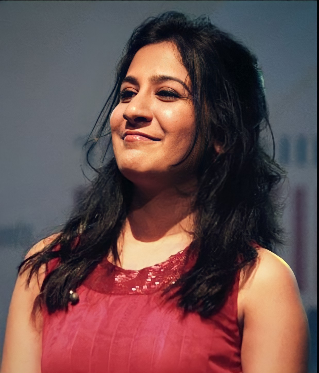 Indian playback singer Shweta Mohan